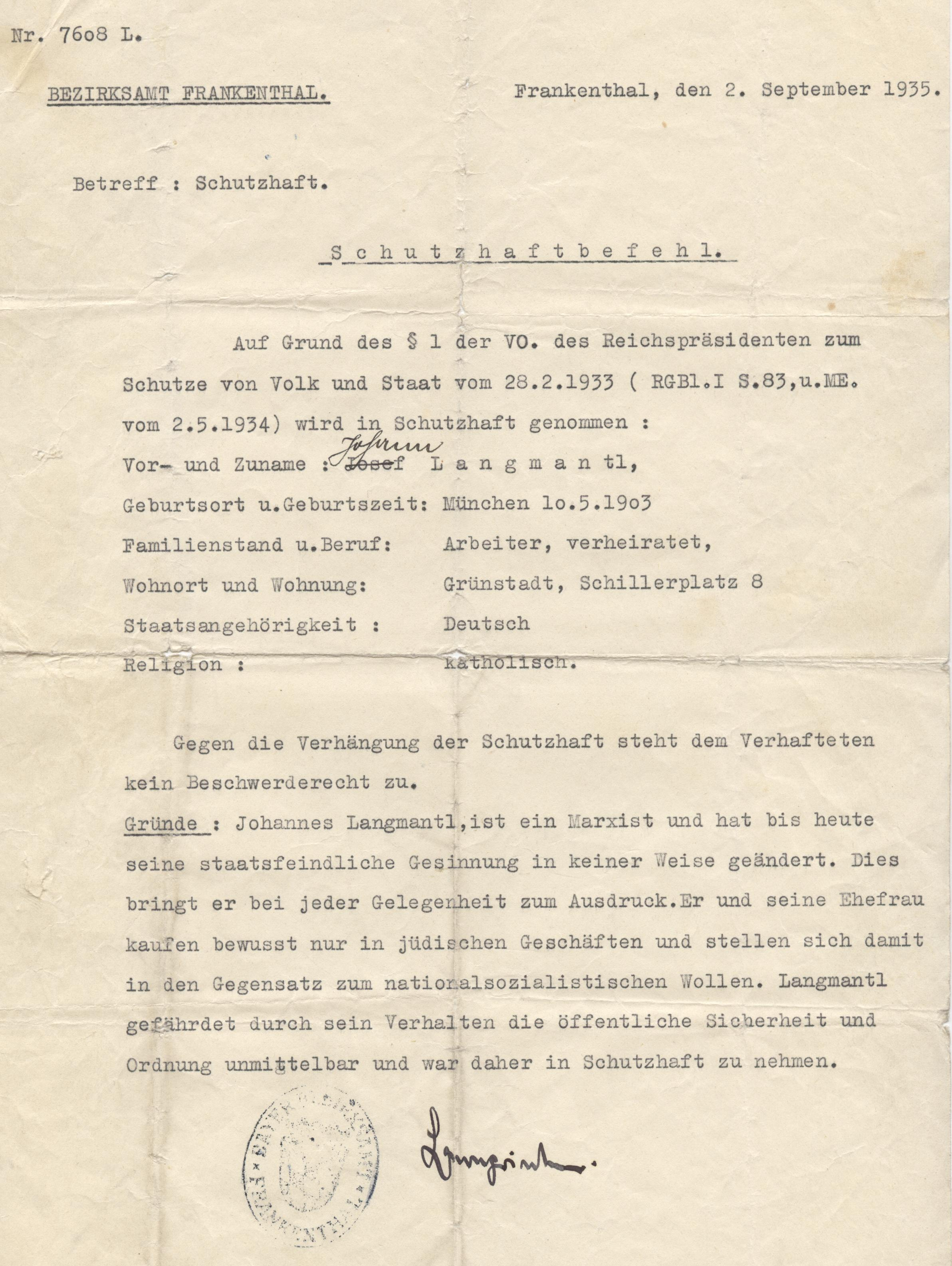 Hans langmantl, Grünstadt, NS-Verfolgter, Haftbefehl